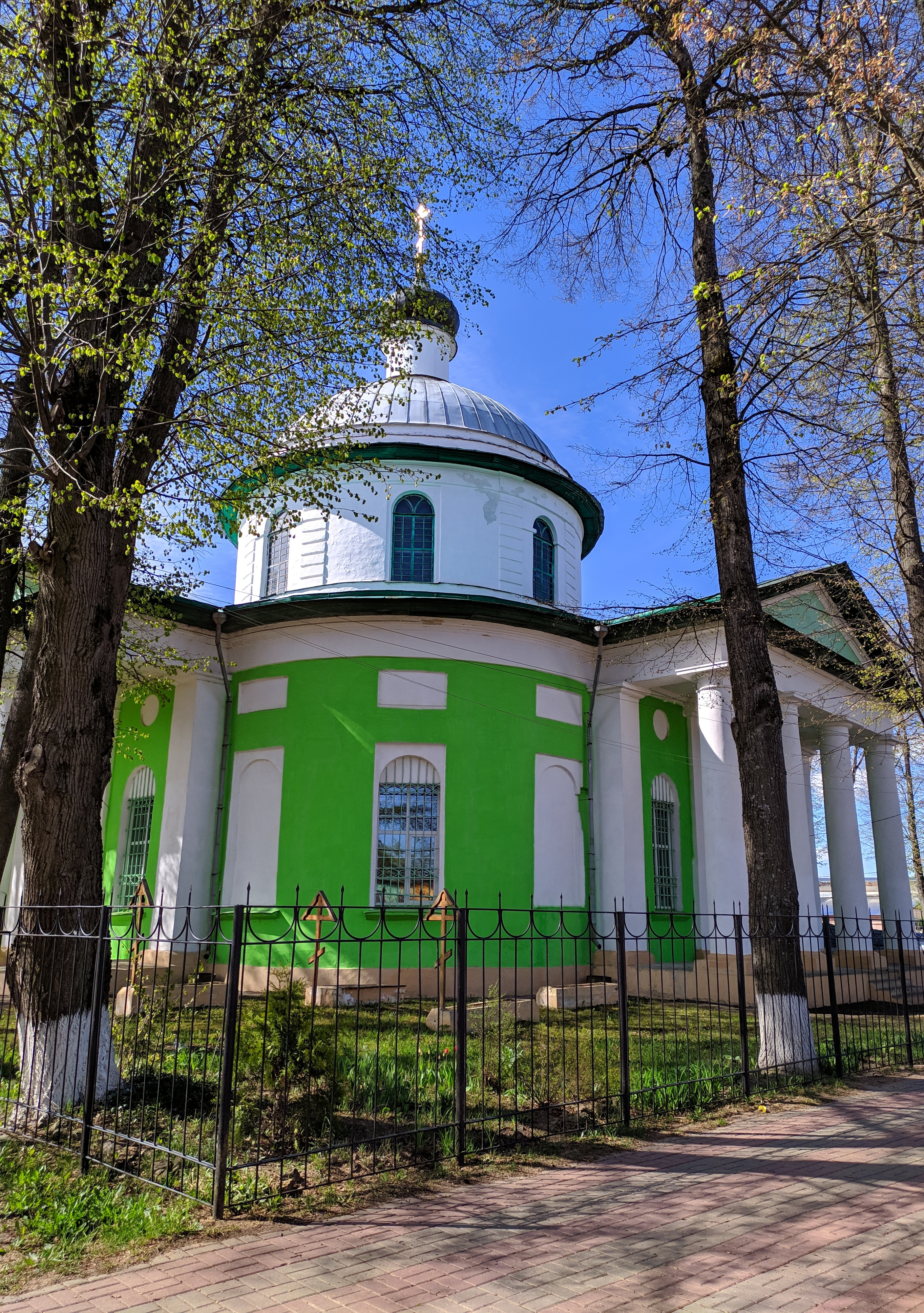 IMG_20190504_102302